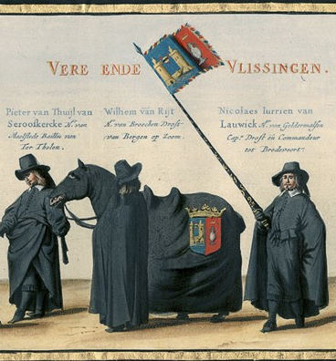 Nicolaas Jurriaan van Lawick, heer van Geldermalsen, kapitein, drost en commandant te Bredevoort, draagt de banderolle van Veere en Vlissingen in de begrafenisstoet van prins Frederik Hendrik van Oranje